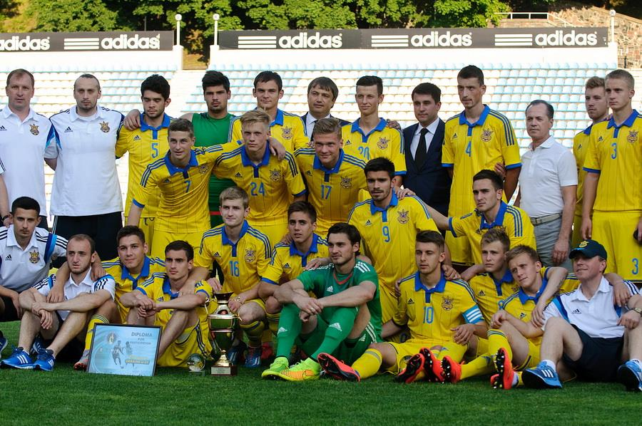 Молодіжна збірна України після поразки у фіналі Турніру пам'яті Валерія Лобановського 2015